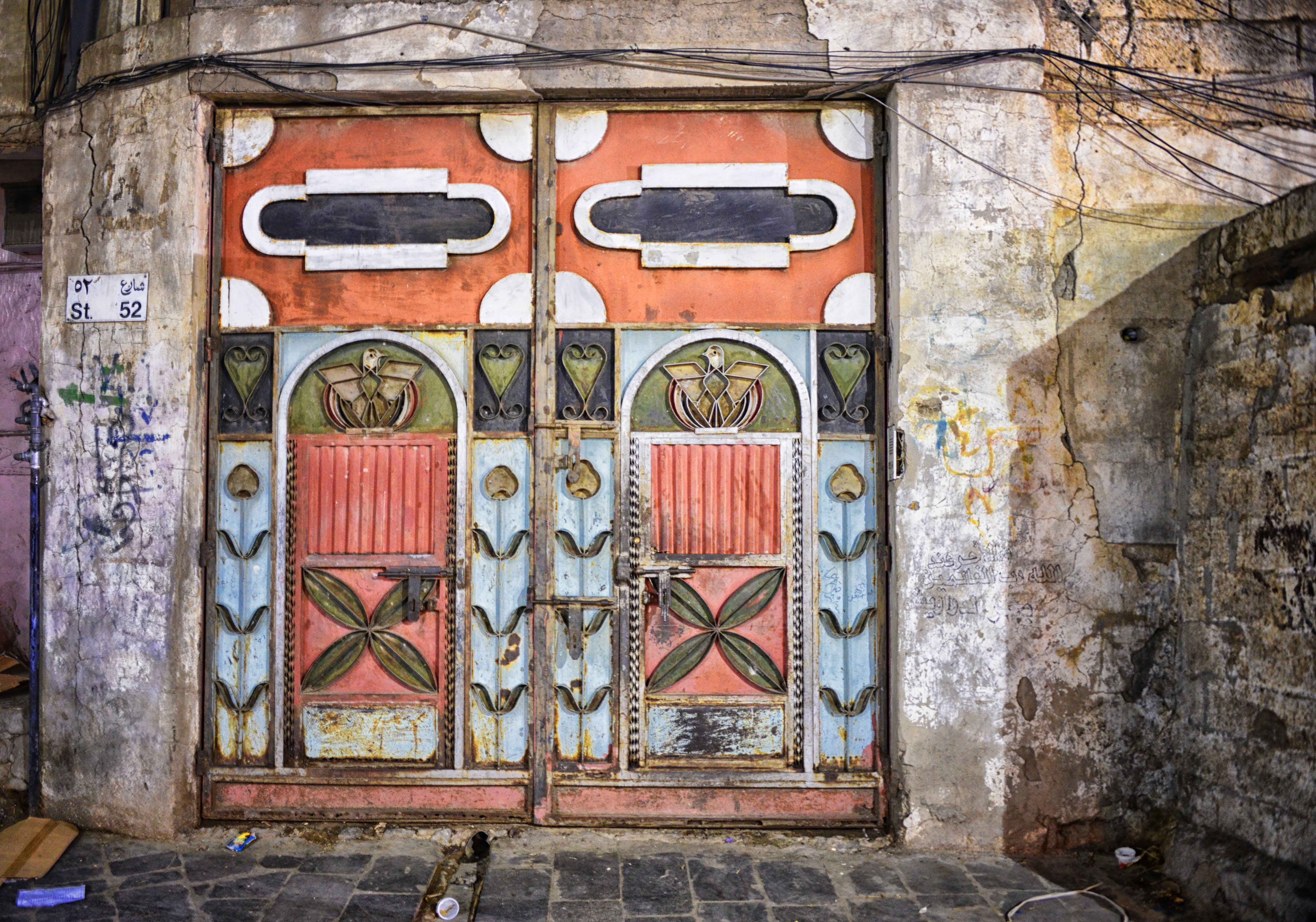 Doors, Yemen